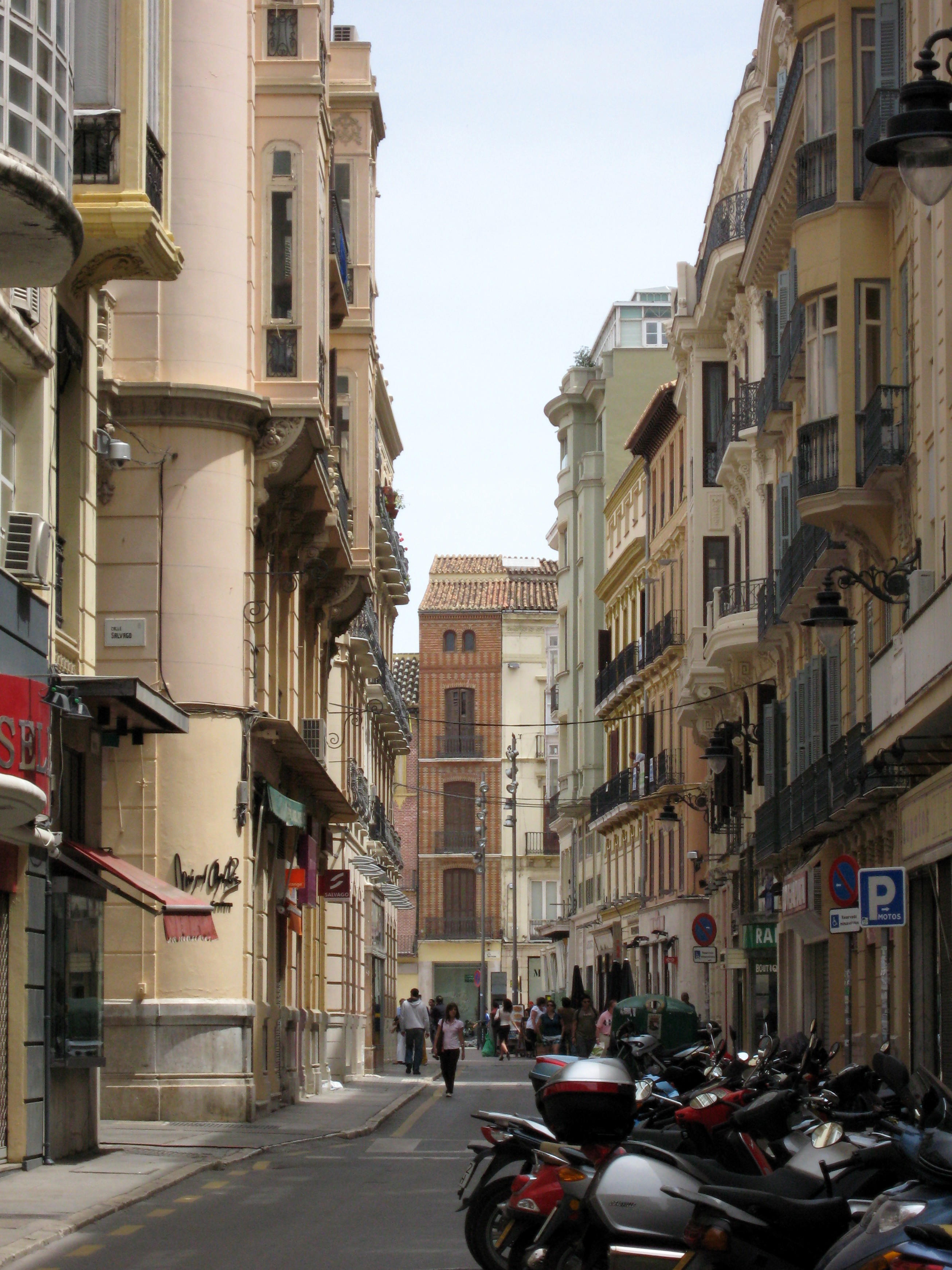 Altstadt von Málaga mit Blick Richtung Plaza de la Constitución, Andalusien, Spanien